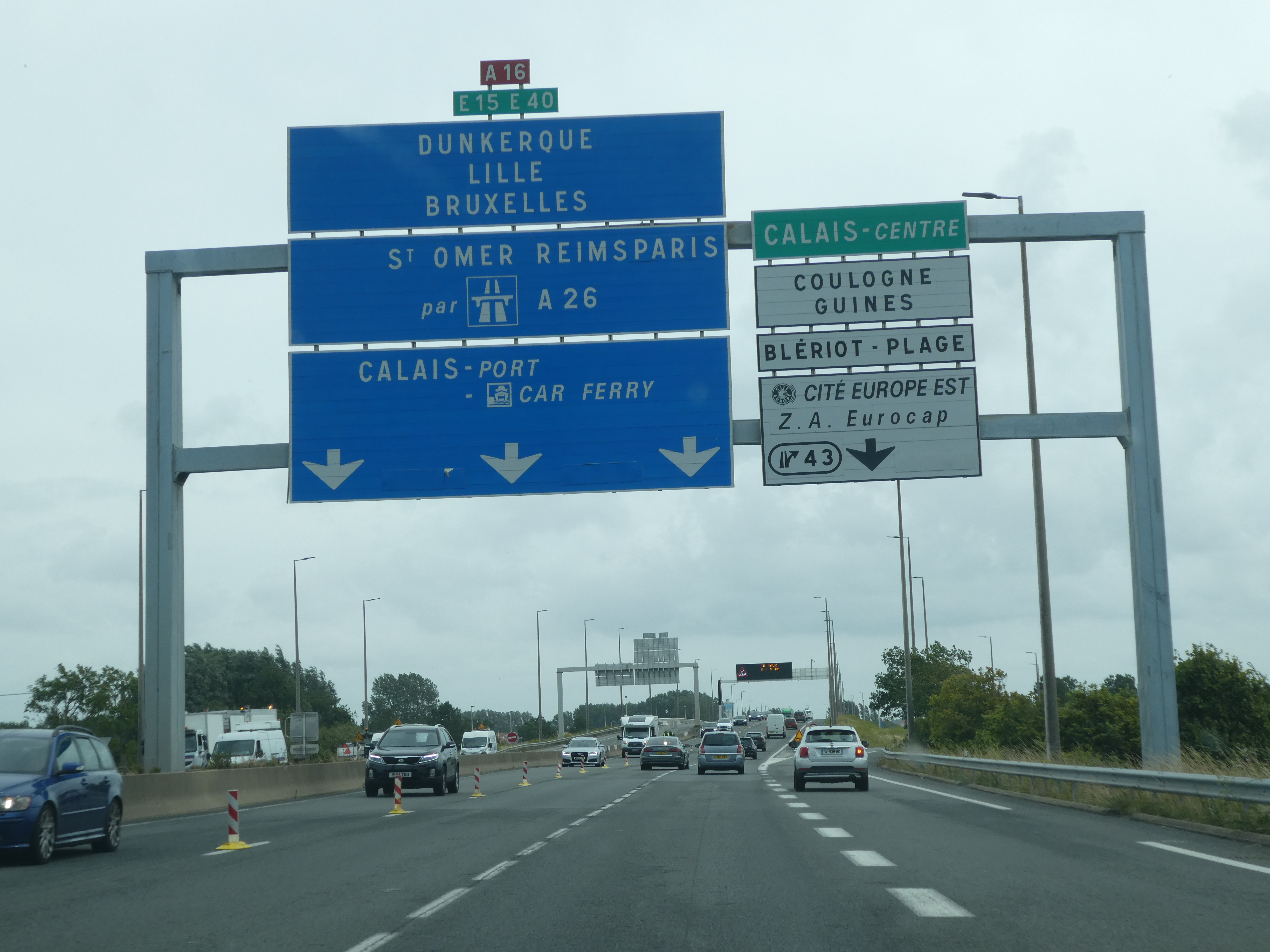 Panneau autoroutier autouroute A16